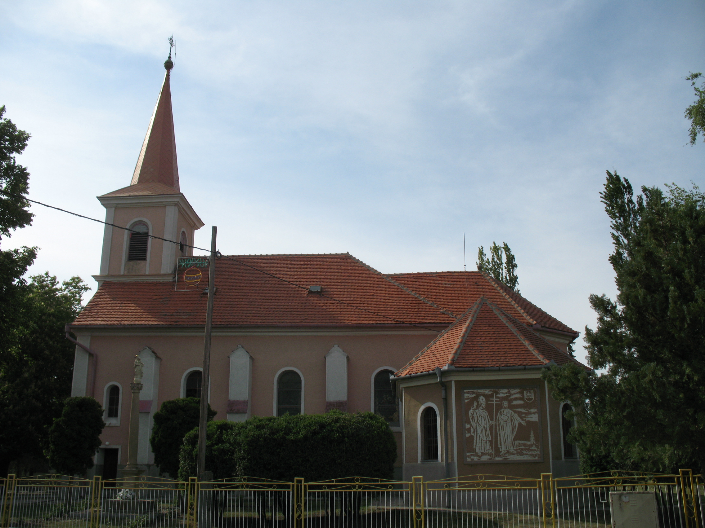 Szőlős róm. kat. templom